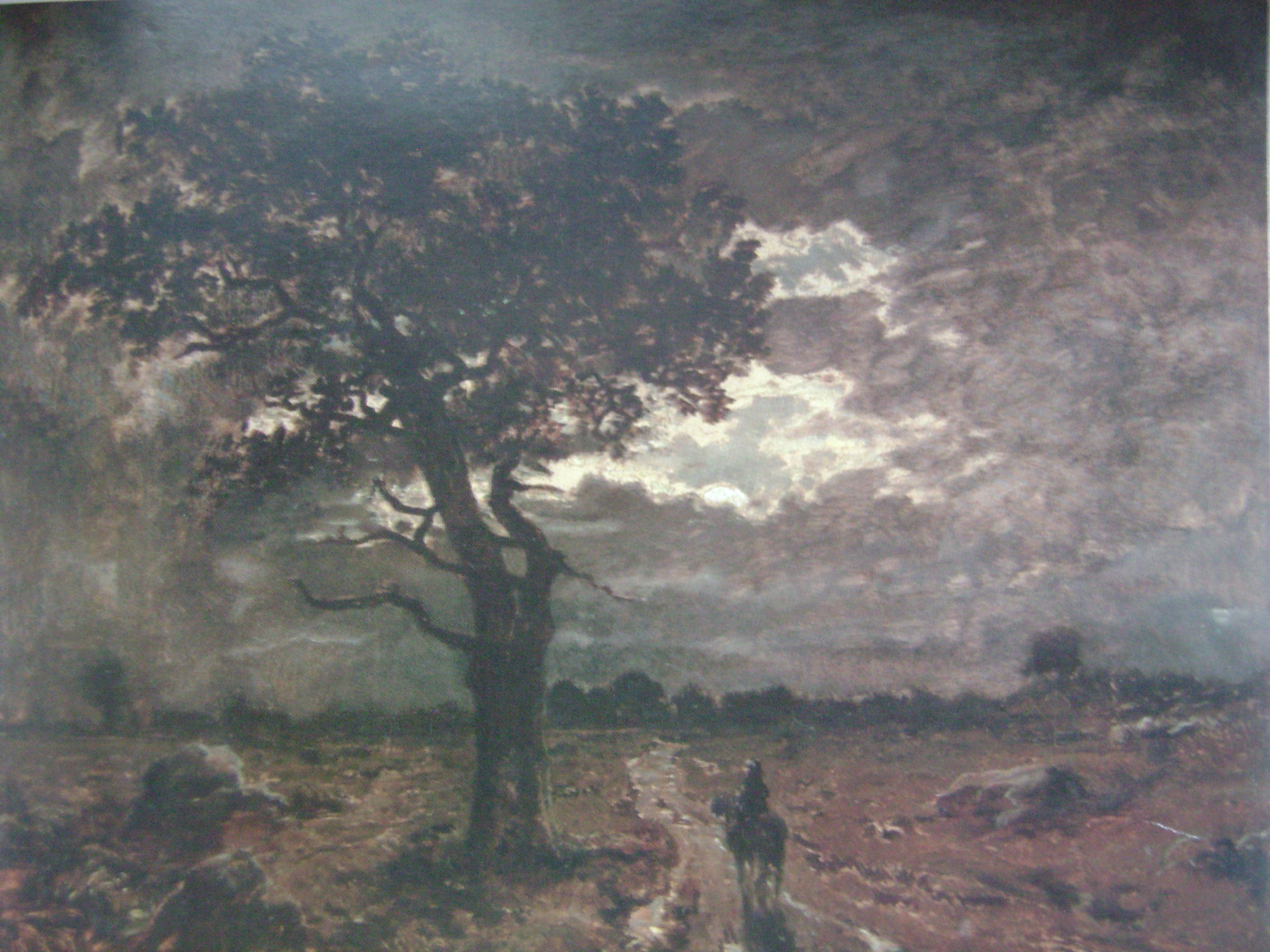 Théodore Rousseau - Le Rageur, Cavalier Sous l'Orage, 1852 - Huile sur toile, 59 x 73 cm, monogramme "TH.R" en bas à droite et cachet de cire rouge au dos. Ancienne collection du peintre Diaz de la Pena, actuellement collection particulière (Le Rageur est un célèbre chêne des Gorges d’Apremont dans la Forêt de Fontainebleau et non loin du village de Barbizon). Pierre et Rolande Miquel nous indiquent que cette toile est l’un des "plus purs chefs-d’œuvre de l’artiste". C’est la vision de l’arbre, aux branches tourmentées et au travers lui celle de toute la nature qui domine le tableau. Comme chez Georges Michel l’homme est tout petit et ne fait que donner l’échelle. La puissance du clair de lune, les branches tourmentées du Rageur contribuent à accentuer la vison animiste de la nature par le peintre et le caractère romantique de l’œuvre. Pierre Miquel - Le Paysage Français au XIXème siècle. L’Ecole de la Nature - Maurs-la-Jolie, Éditions de la Martinelle, 1975, tome III, décrit p. 54 et reproduit p. 455 Rolande et Pierre Miquel - Théodore Rousseau 1812-1867 - Paris, Éditions Somogy, 2010, décrit et reproduit p. 172. Archives Braun – Archives Pierre et Rolande Miquel – Archives Frick Library, New York, U.S.A.